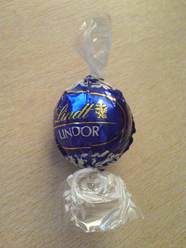 Dark Lindor truffle